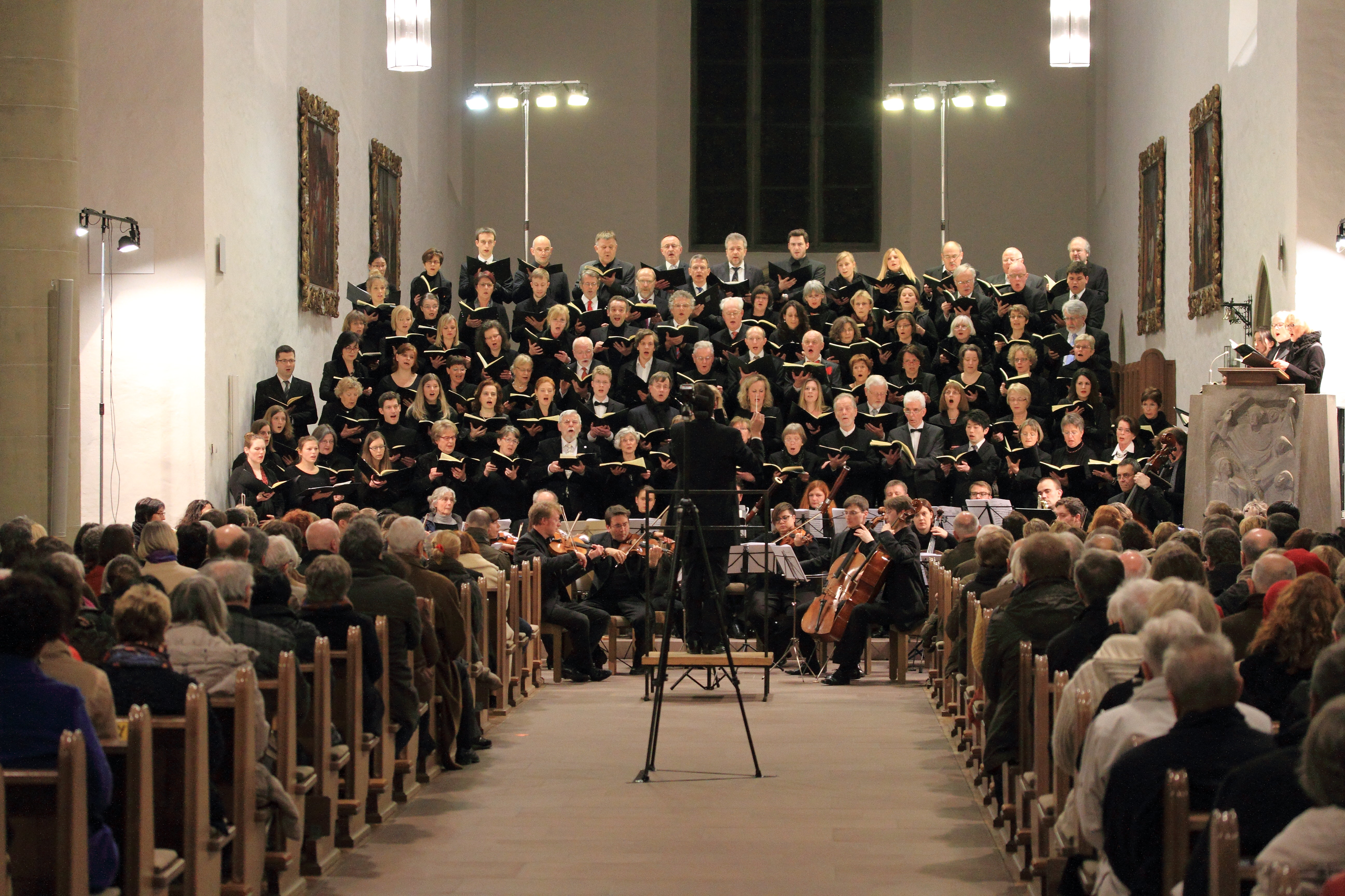 Der Oratorienchor Würzburg unter Leitung von Matthias Göttemann bei der Aufführung der Großen Messe c-Moll von W.A. Mozart in der Franziskanerkirche Würzburg. Mitwirkende waren Danuta Dulska (Sopran), Anna Haase (Mezzosopran), Jörn Lindemann (Tenor) und Tohru Iguchi (Bass).